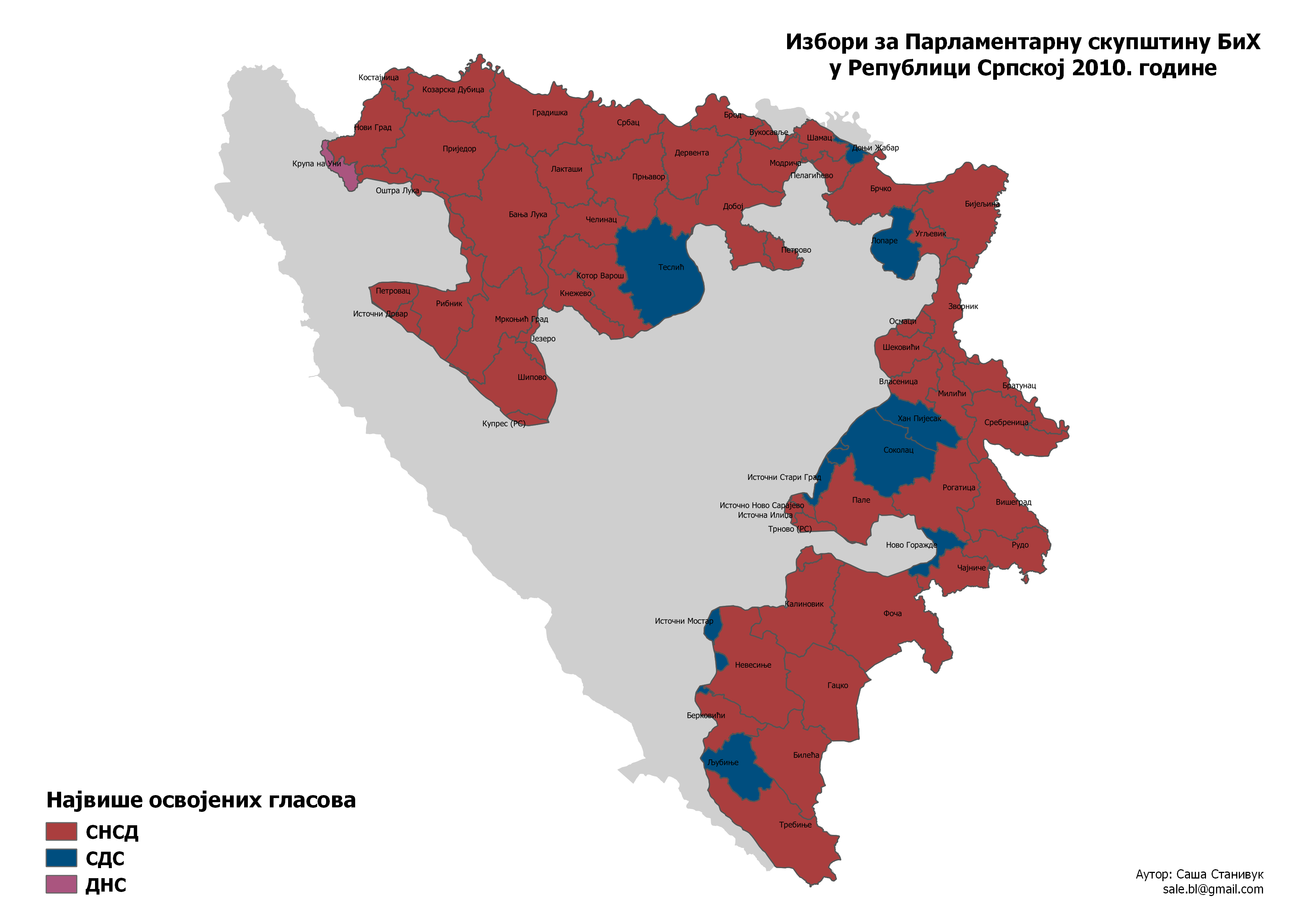 Српски (ћирилица): Избори за Парламентарну скупштину БиХ у Републици Српској 2010. године